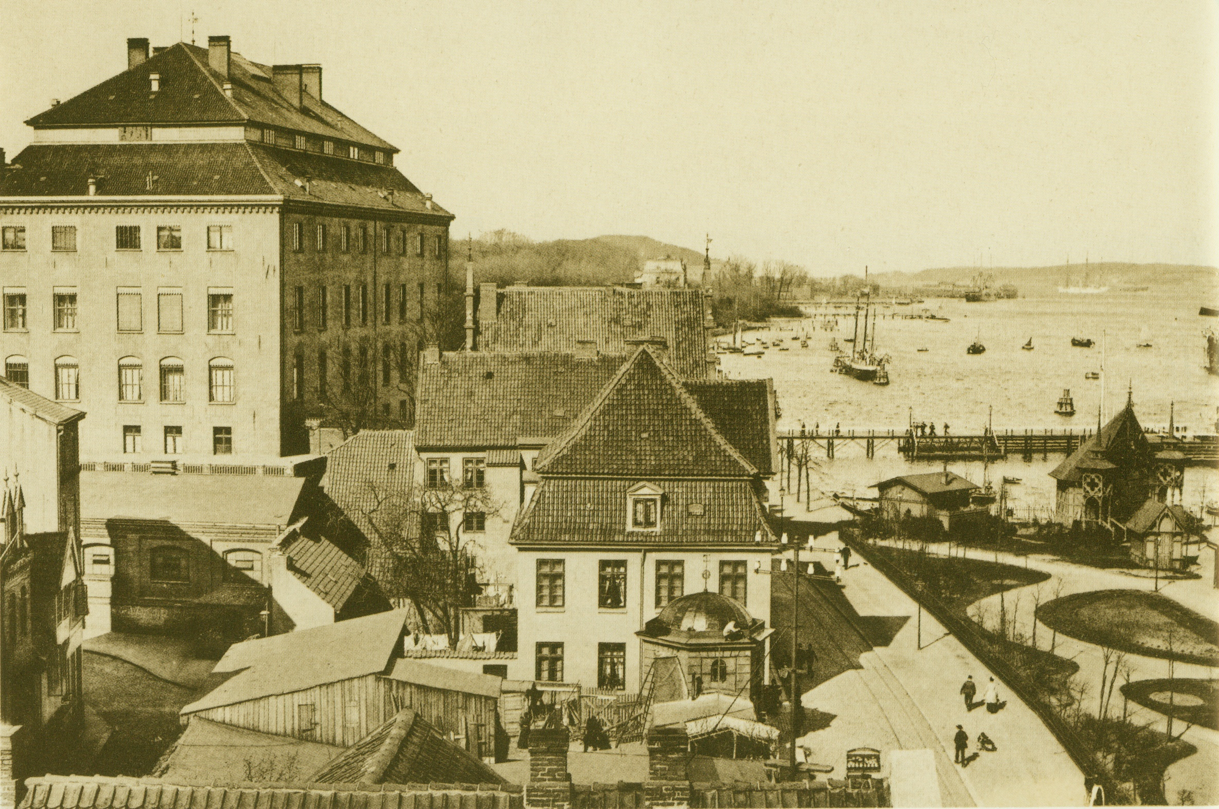 Kiel: An der Barbarossabrücke beim Schloss (1893)